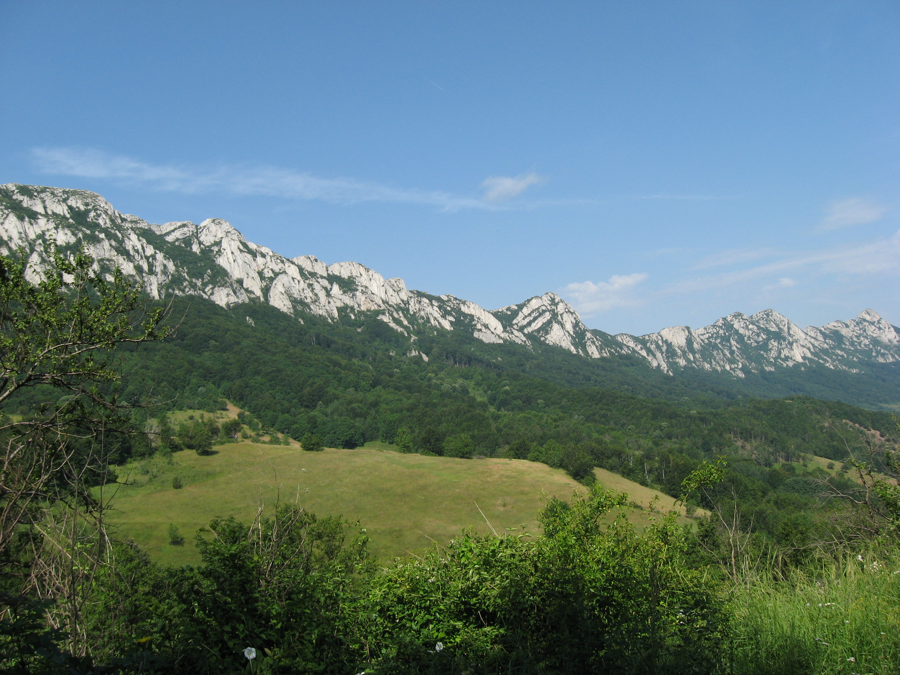 Srpski (latinica): Ово је фотографија заштићеног природног добра у Србији под шифром: ПИО24 This is a a photo of a natural area in Serbia with ID: ПИО24 Предео изузетних одлика Бора